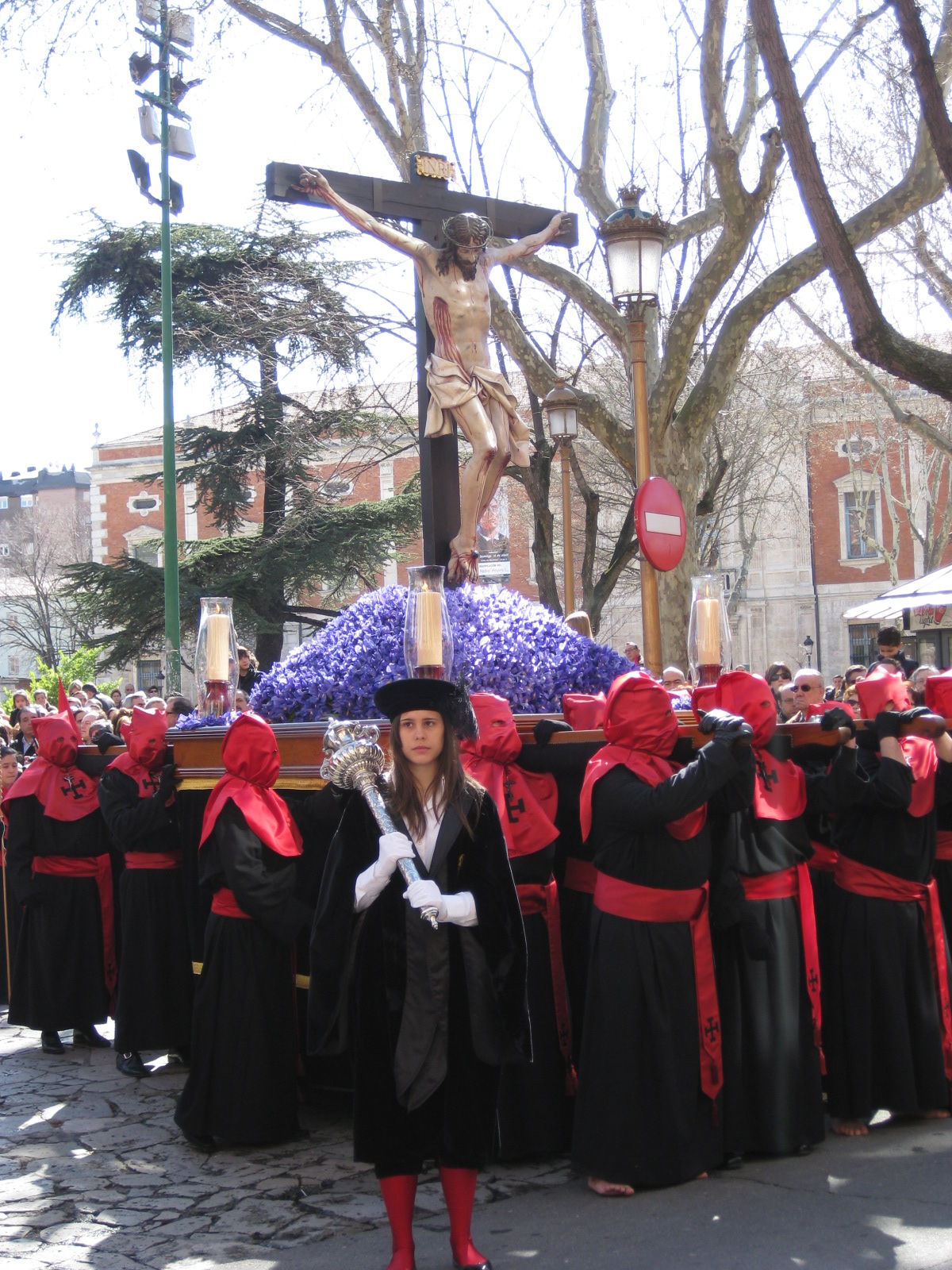 Santísimo Cristo de la Luz. Hermandad Universitaria del Santo Cristo de la Luz, Valladolid (España).